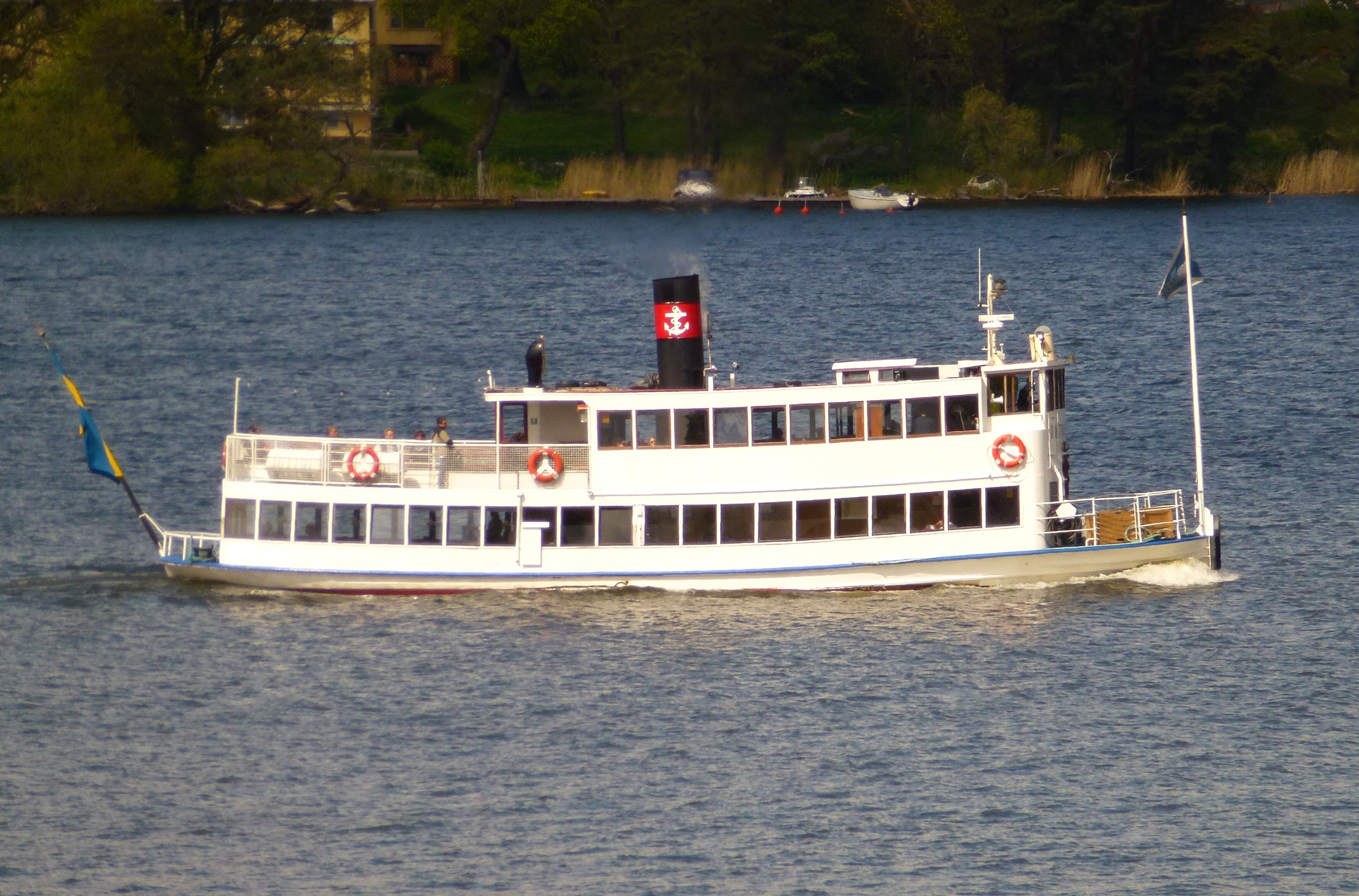 S/S Drottningholm vid Stora Essingen